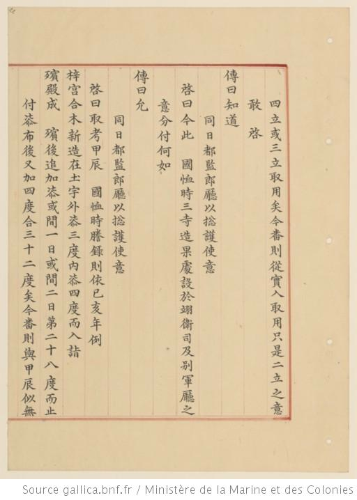 Titre : 선의왕후 빈전도감의궤 . 宣懿王后 殯殿都監儀軌 . Sōn ūi oañ hu pin čōn do kam ūi kue. Manuscrit. Rituels et cérémoniques politiques, Cour et courtisans. Corée. Cérémonial prévu par les conseillers la salle funéraire (빈전 / 殯殿) de la reine Seon Ui. Papier hanji en excellent état de conservation. - 205 f. - . 12 col. par pages. 25 caractères par colonne. Encadradement tracé en rouge. Reliure métallique à motifs de lotus. Provenance : bnf.fr. Source